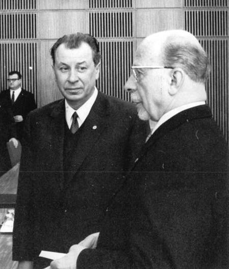 Hermann Pöschel mit Walter Ulbricht